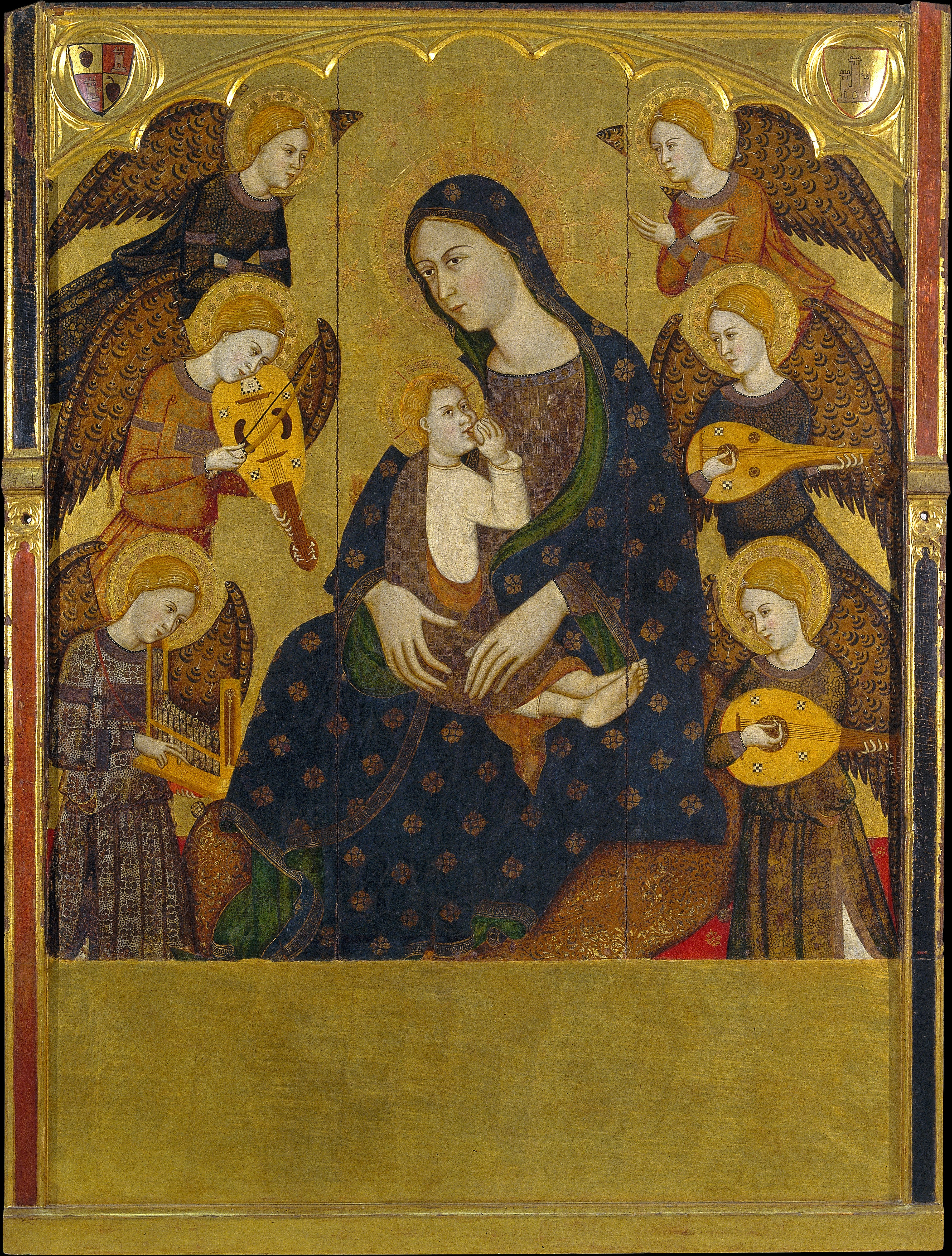 La obra representa a la Virgen María amamantando a su hijo, el Niño Jesús.